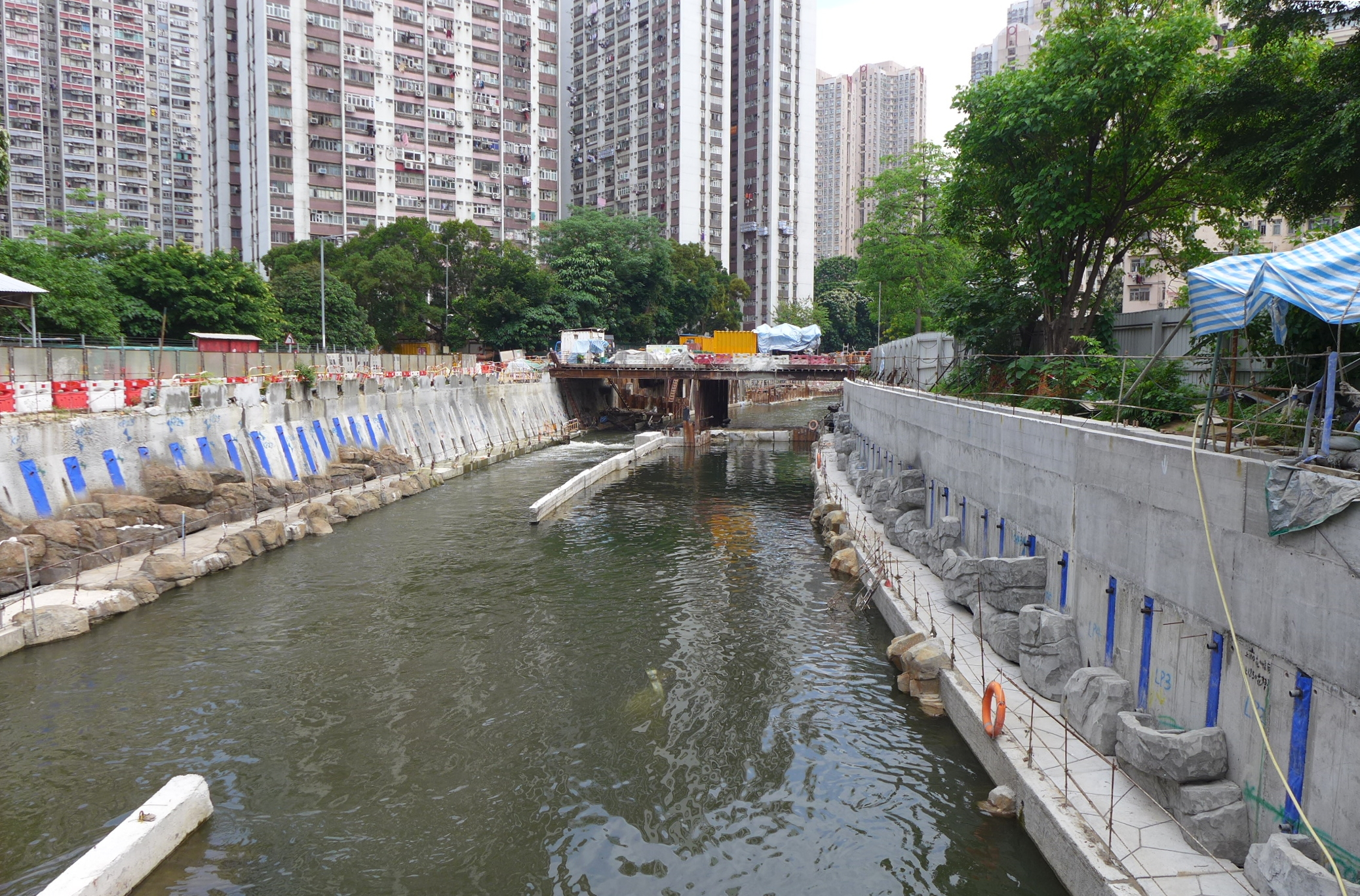 Kai Tak River Improvement Works